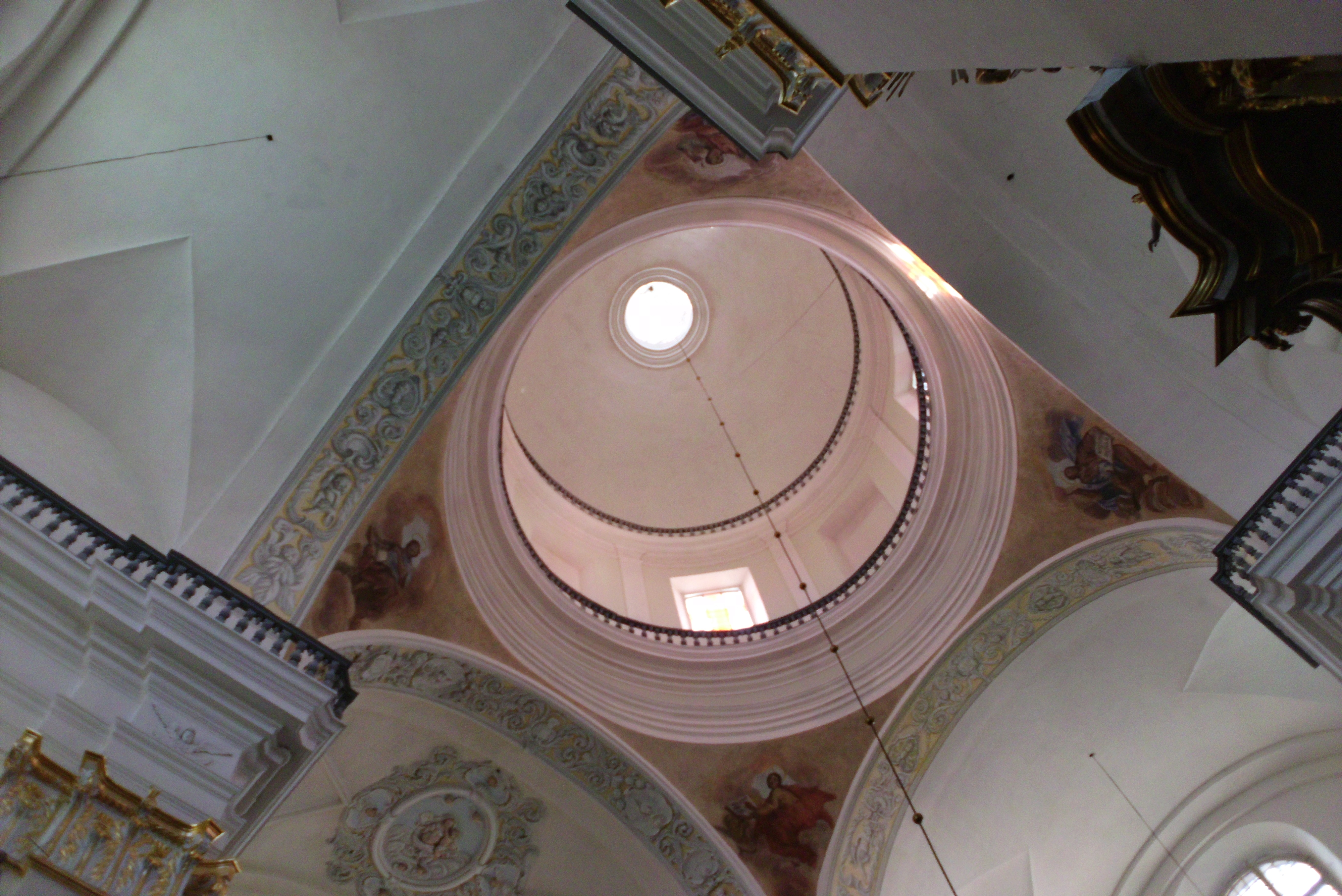 Kwiecień w Grodnie